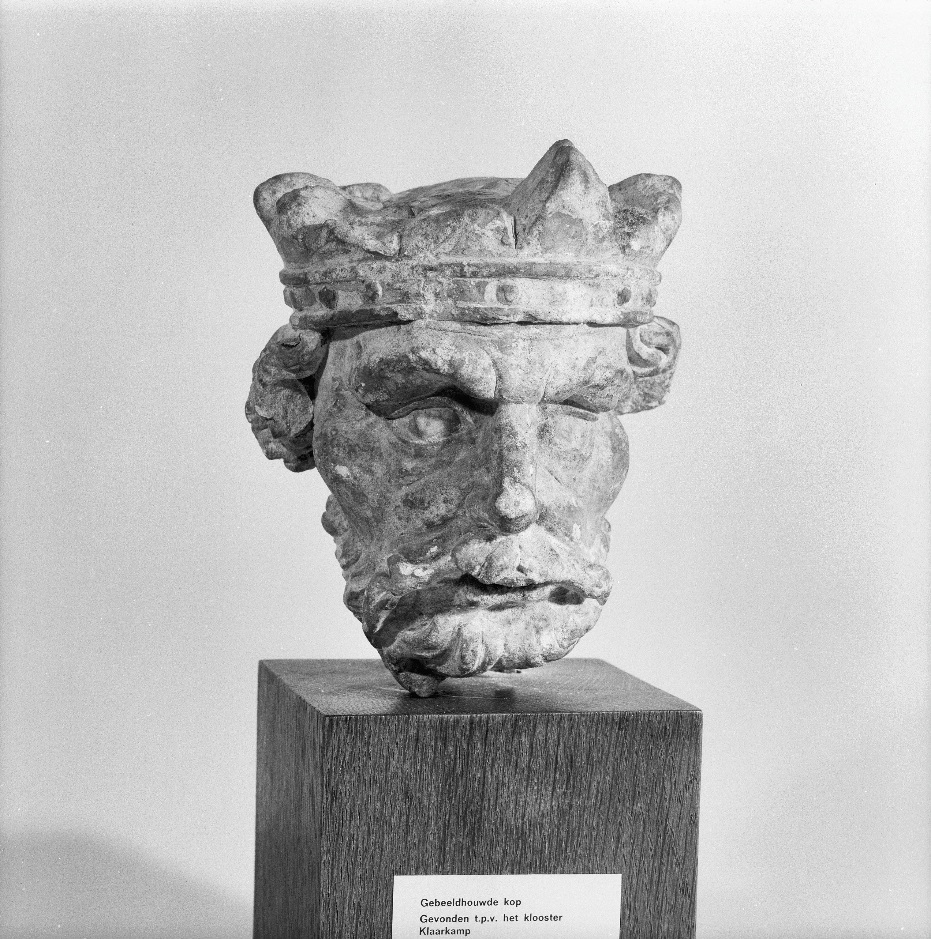 Fries Museum: gebeeldhouwde kop gevonden ter plaatse van het klooster Klaarkamp Collectie Fries Museum